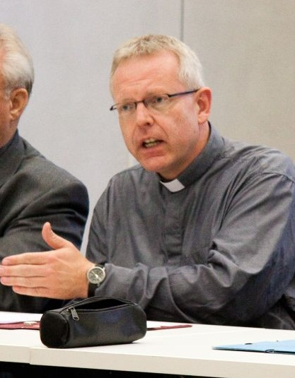 Porträt